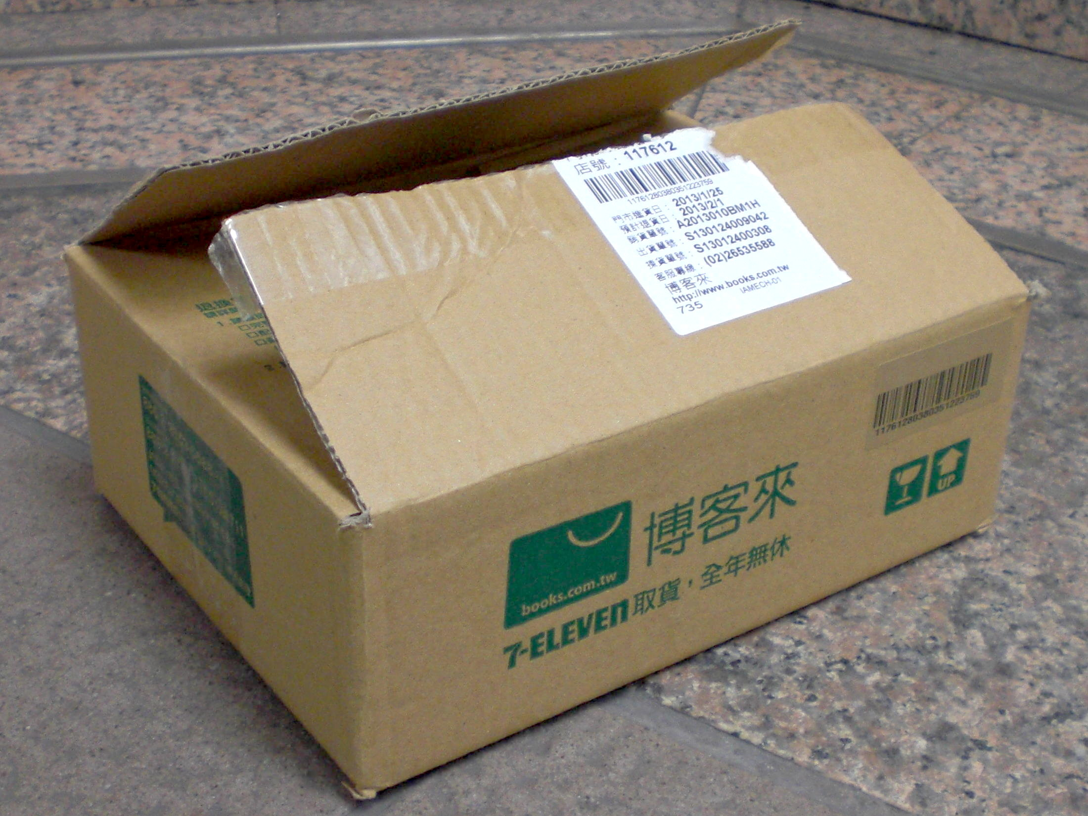 2013年1月25日的博客來W020紙箱